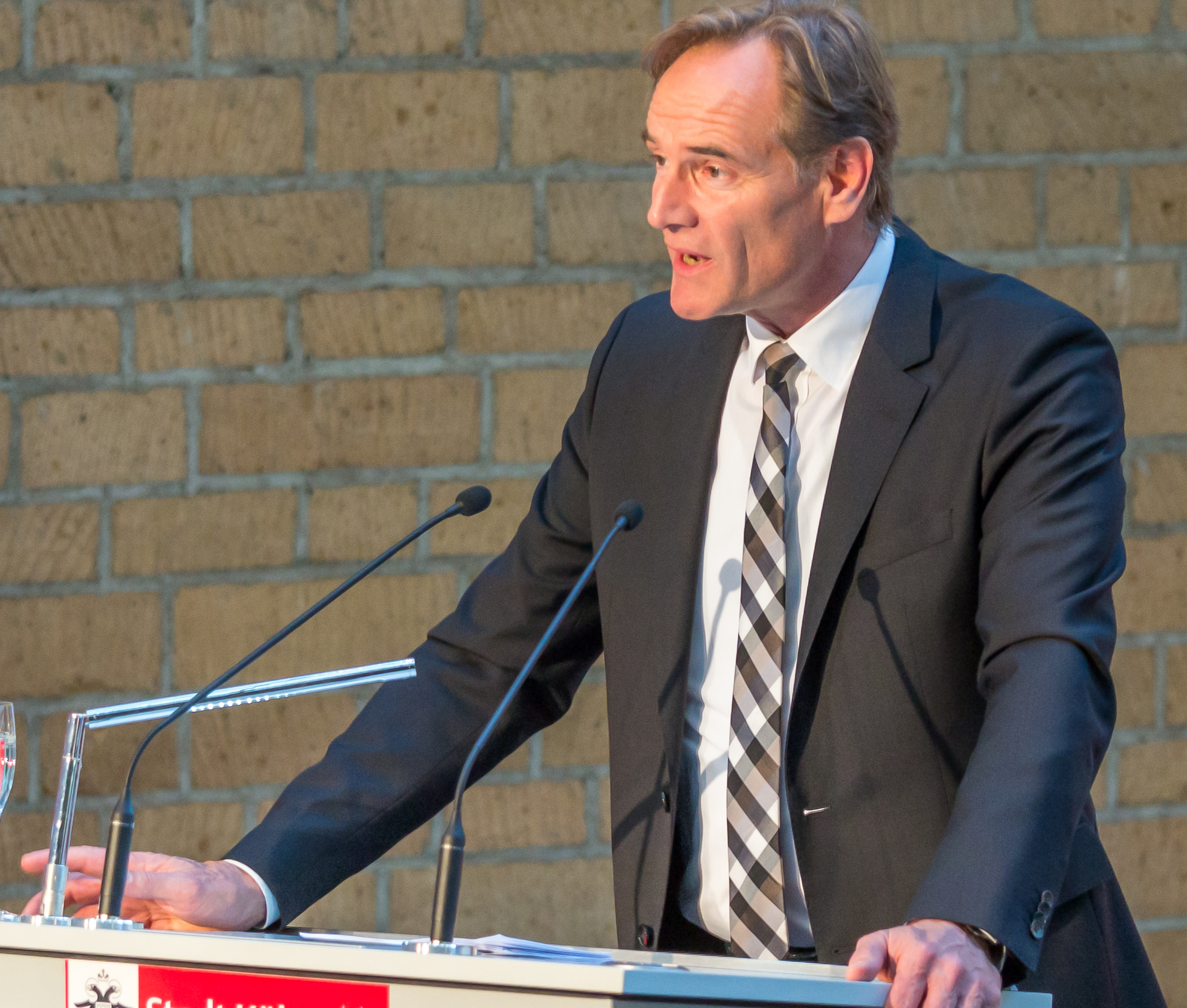 Verleihung des Konrad-Adenauer-Preises der Stadt Köln 2015 an Vitali Klitschko in der Piazetta des Historischen Rathauses von Köln Laudatio durch Burkhard Jung, Oberbürgermeister Leipzig